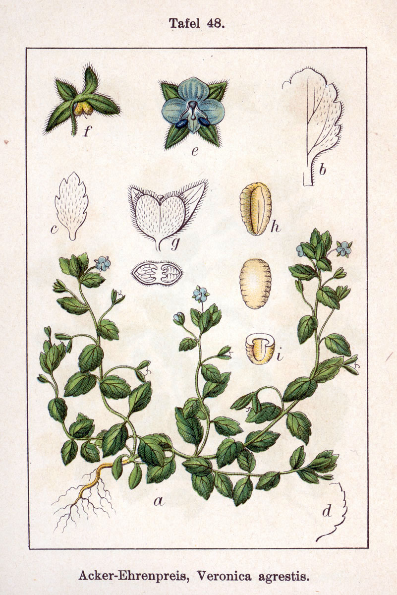 Veronica agrestis L. Original Description Acker-Ehrenpreis, Veronica agrestis